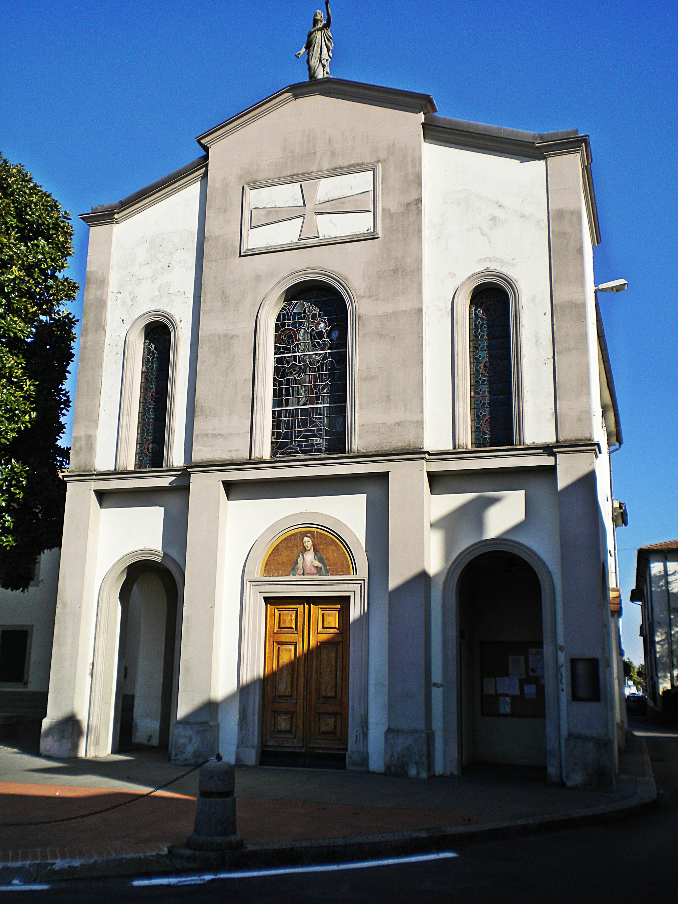 San Michele